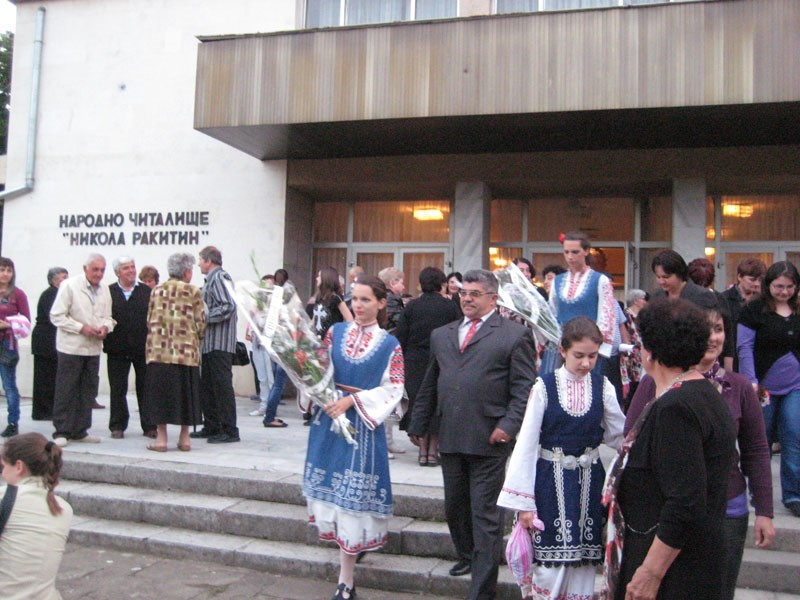 Народно читалище „Никола Василев Ракитин 1890“